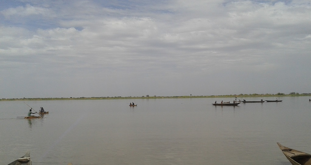 White Nile Beach Fishing in Kosti City